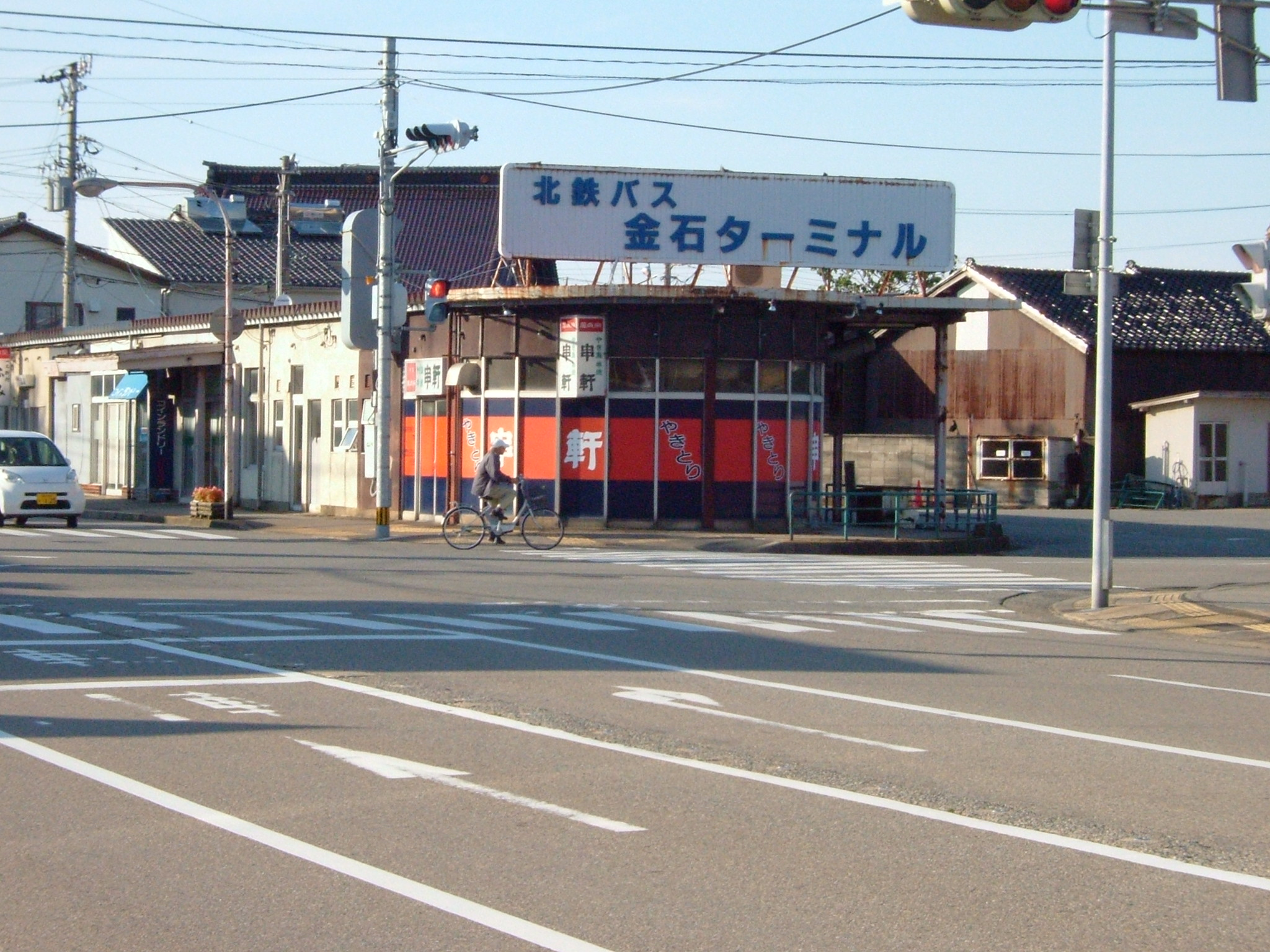 北陸鉄道金石バスターミナル（石川県金沢市）